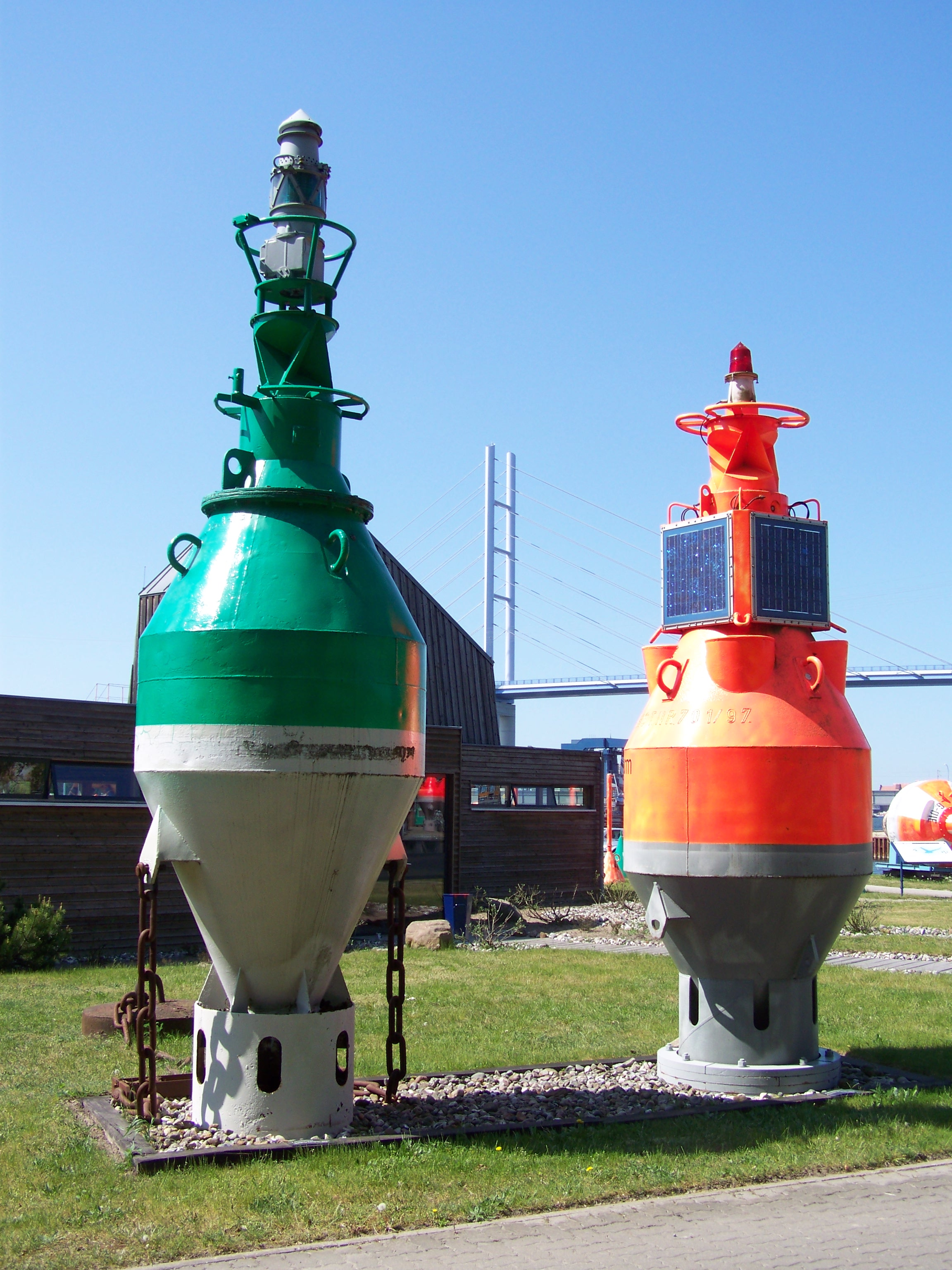 Flachwassertonnen (Seezeichen) im Nautineume Stralsund (2008-05-11)